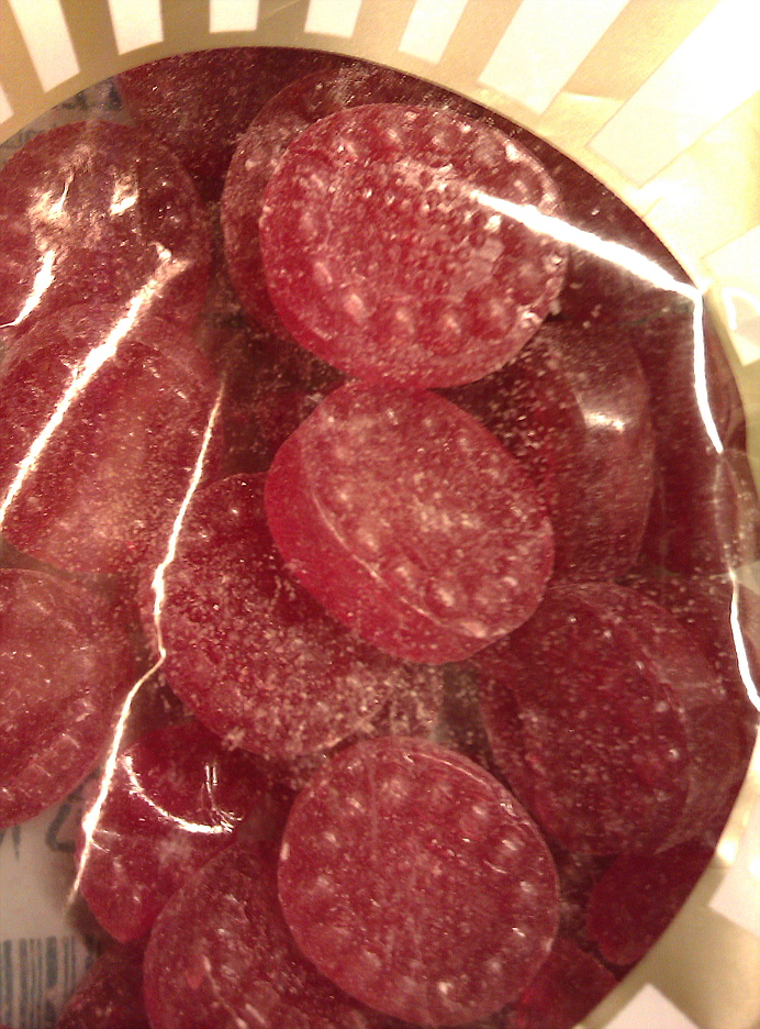 Kongen af Danmark, bolche